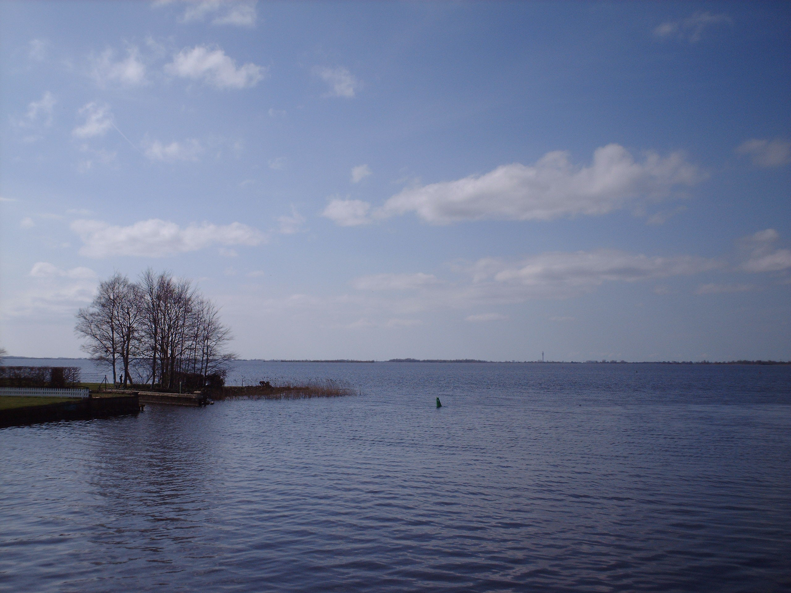 Tjeukemeer en Broeresleat bij buurtschap Vierhuis